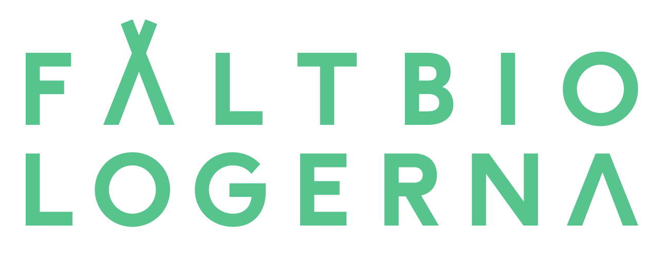 Fältbiologernas logotyp